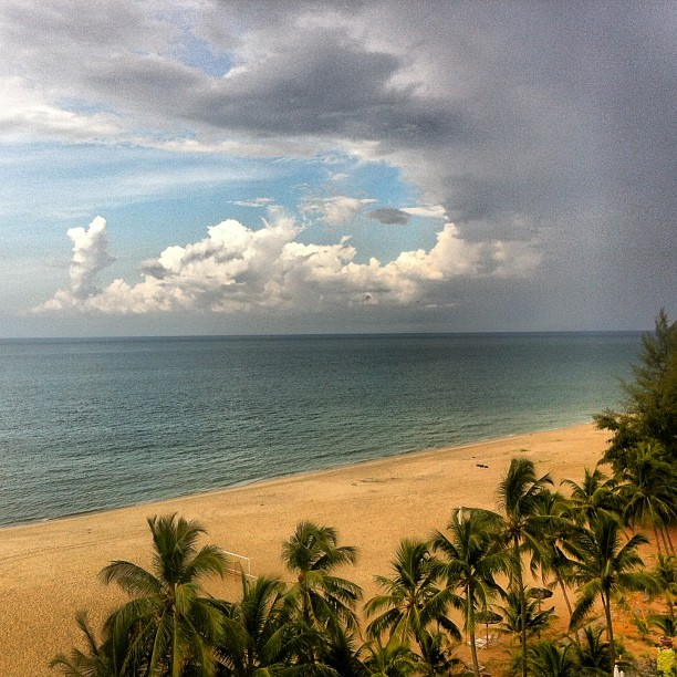 Sea view of Kuala Terengganu